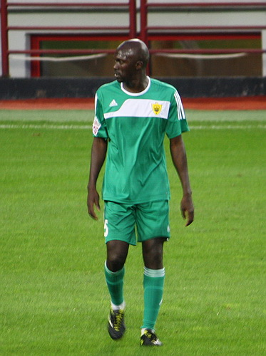 Kebe Baye